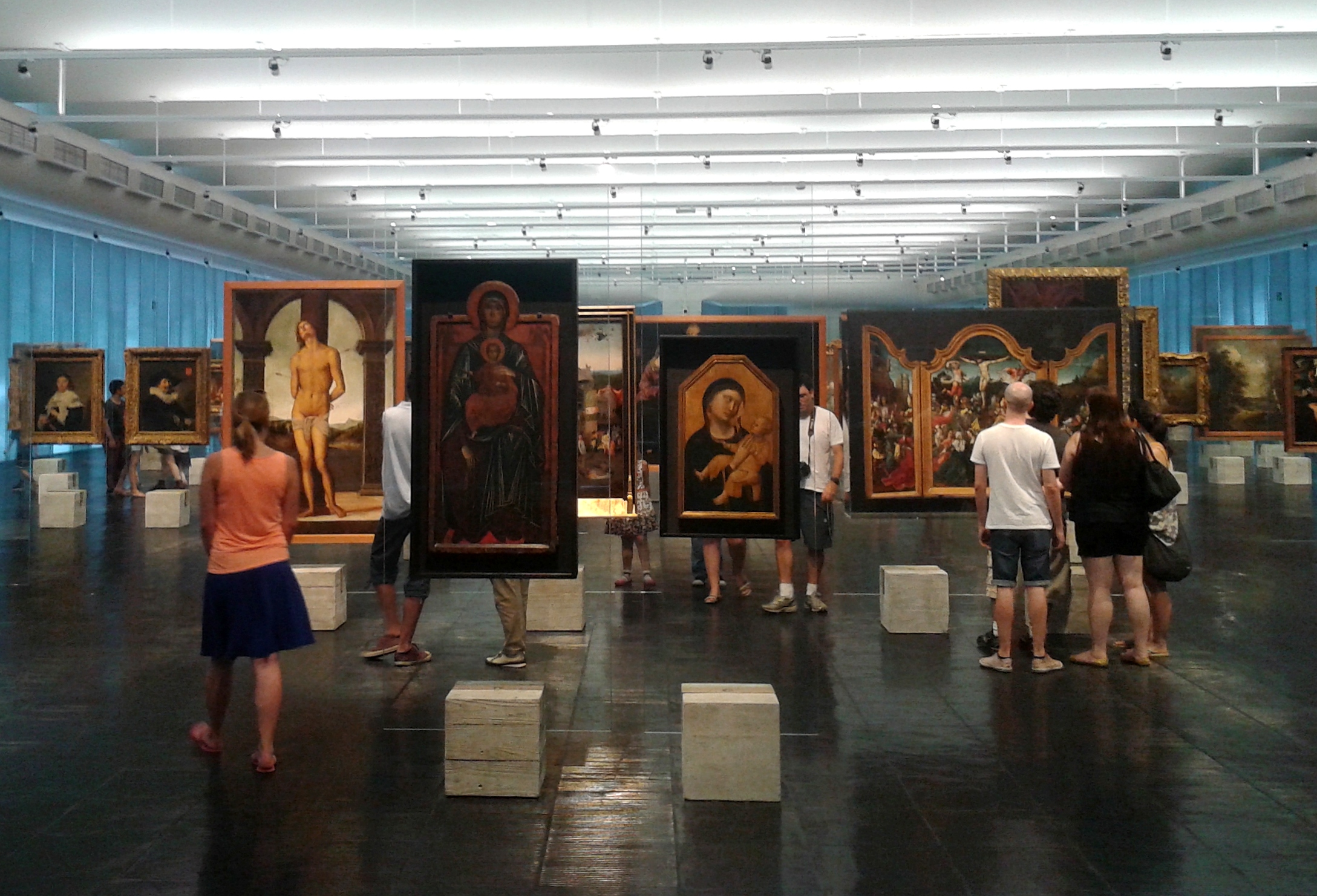 Sala Georges Wildenstein (acervo permanente) no 2º andar do Museu de Arte de São Paulo (MASP). Exposição de obras-primas do acervo nos cavaletes de cristal concebidos por Lina Bo Bardi, parte da expografia inaugural da instituição. São Paulo, SP, Brasil.